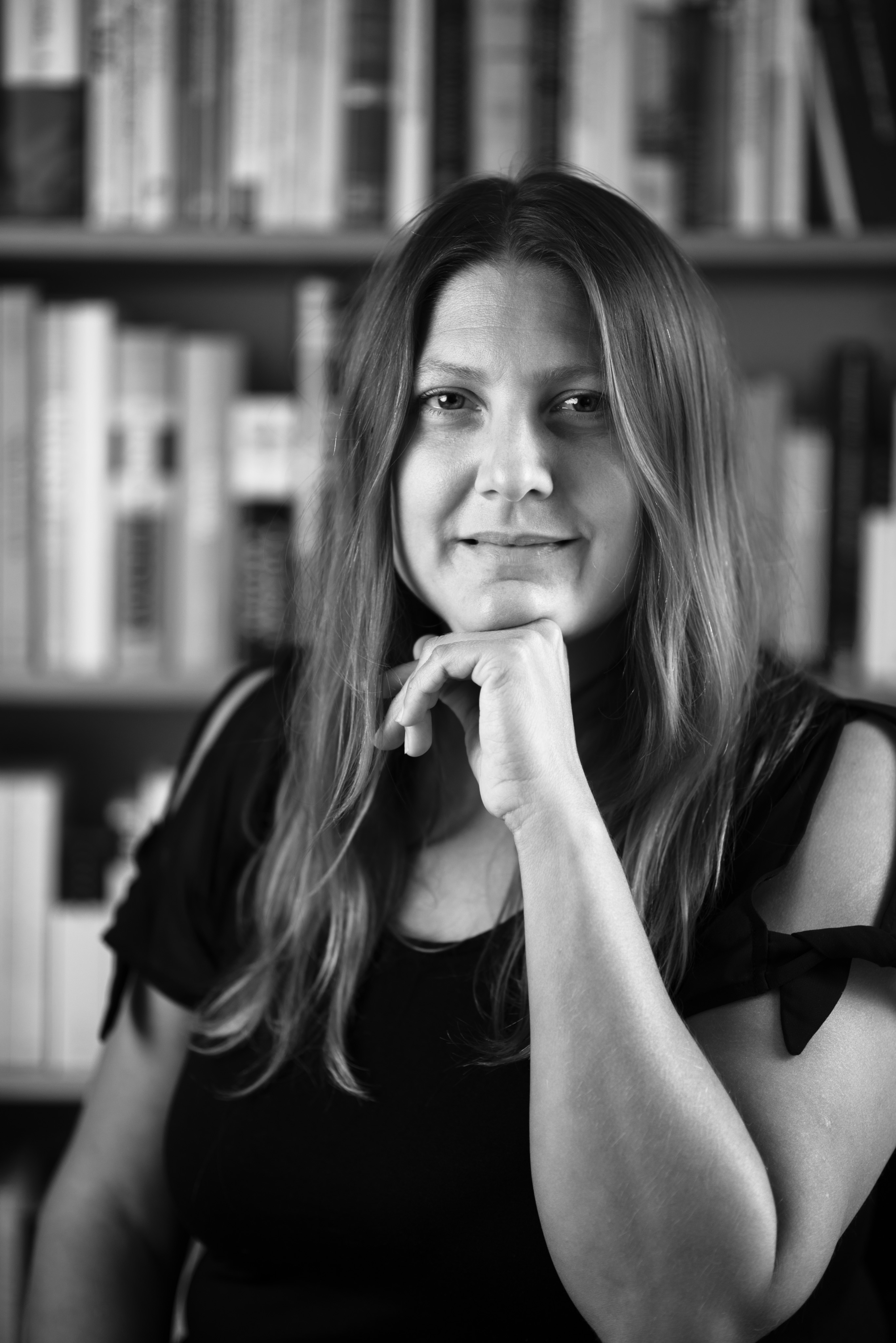 Porträt von Autorin Dr. Claudia Skopal